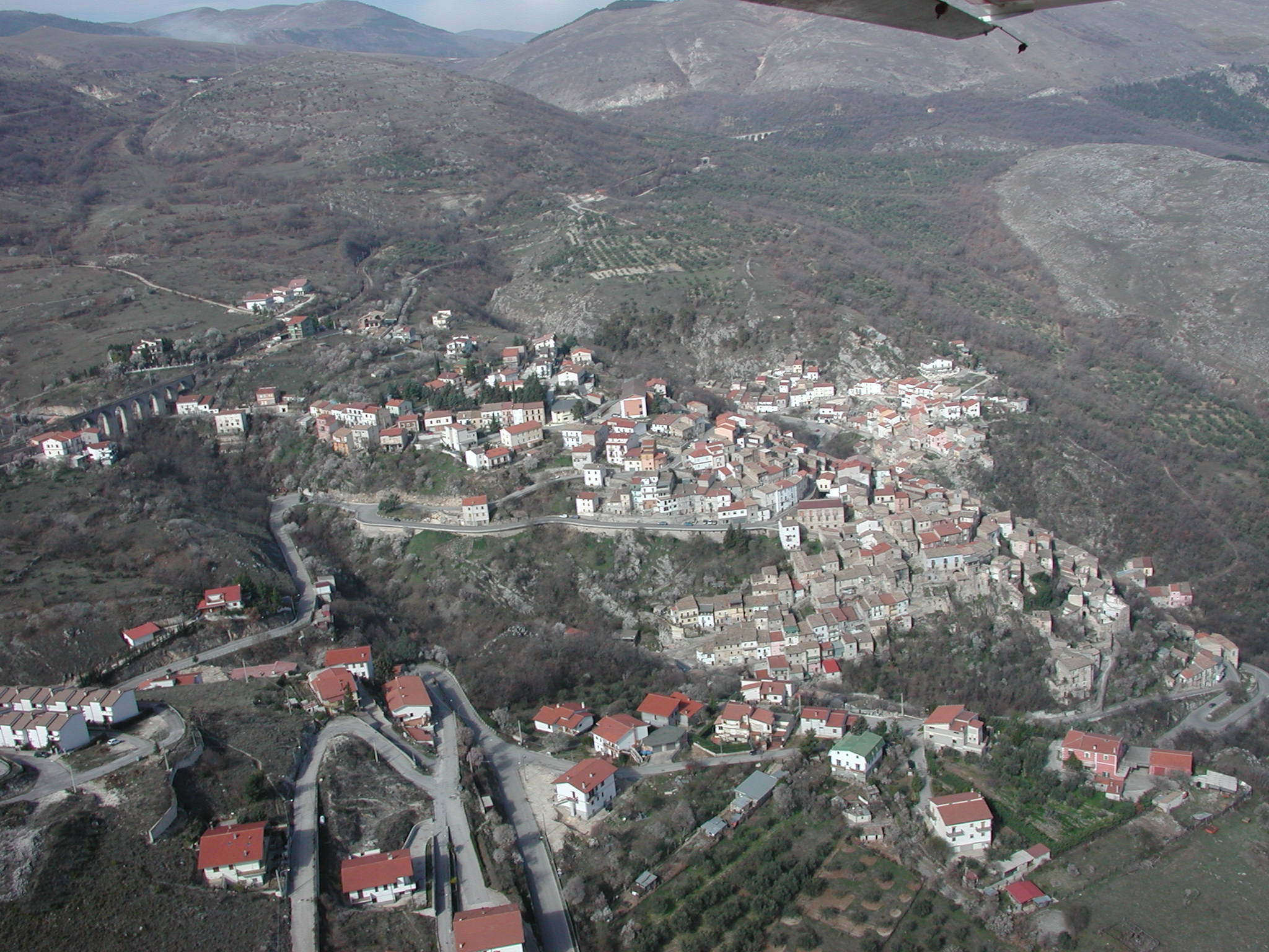 Prezza, Italy